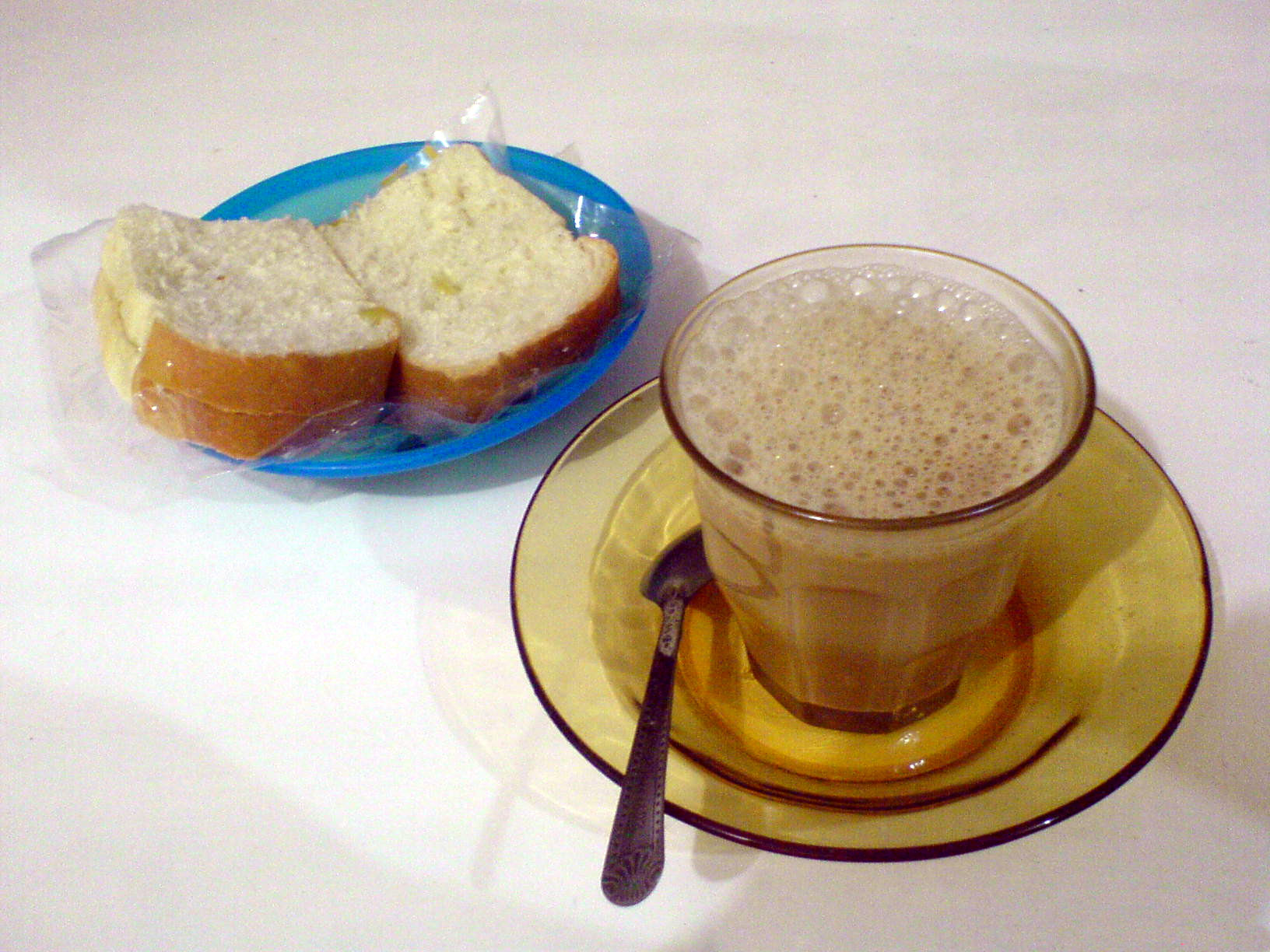 Sanger dan roti selai khas Aceh